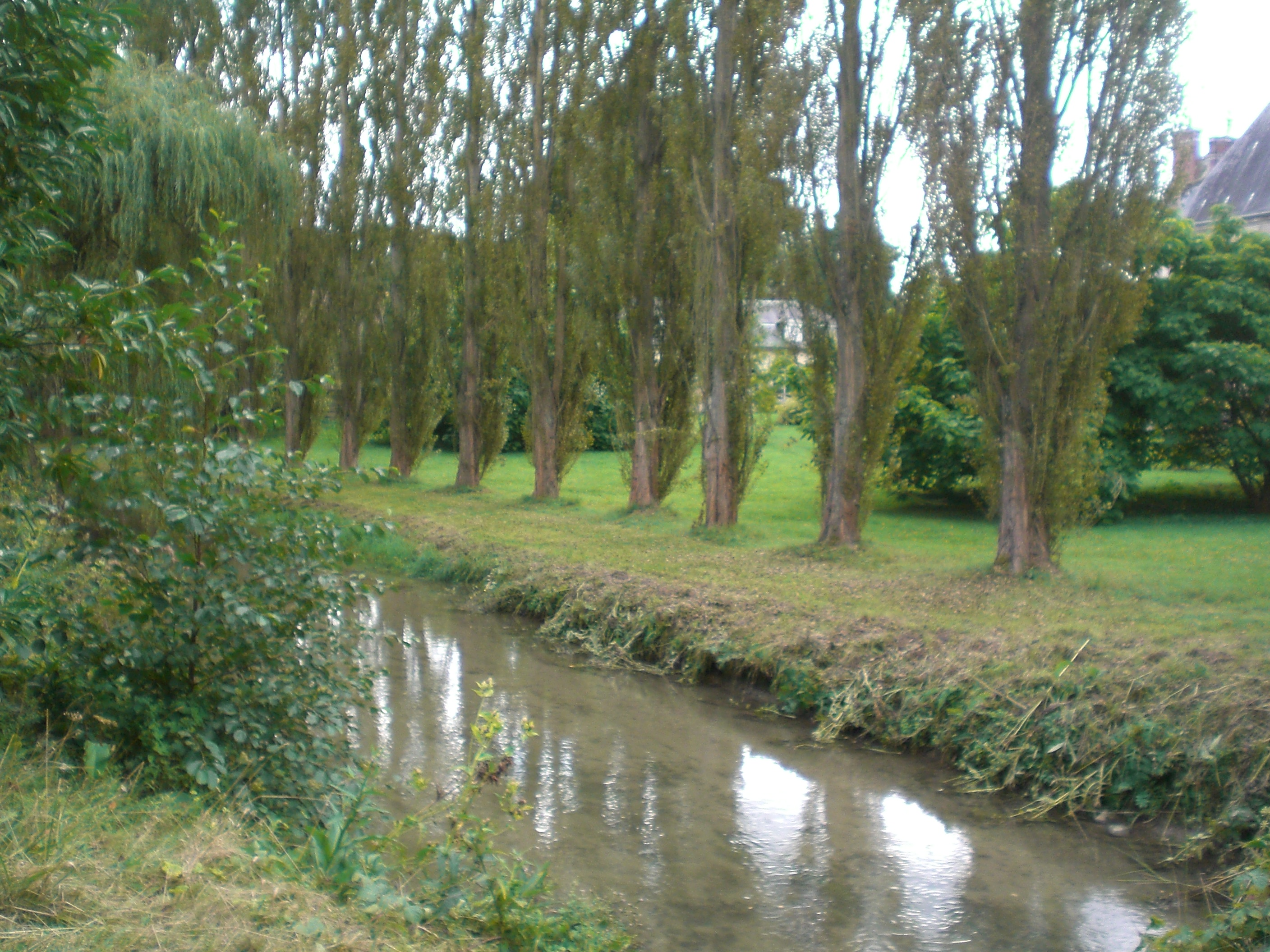 l'esches a fosseuse à coté du chateau